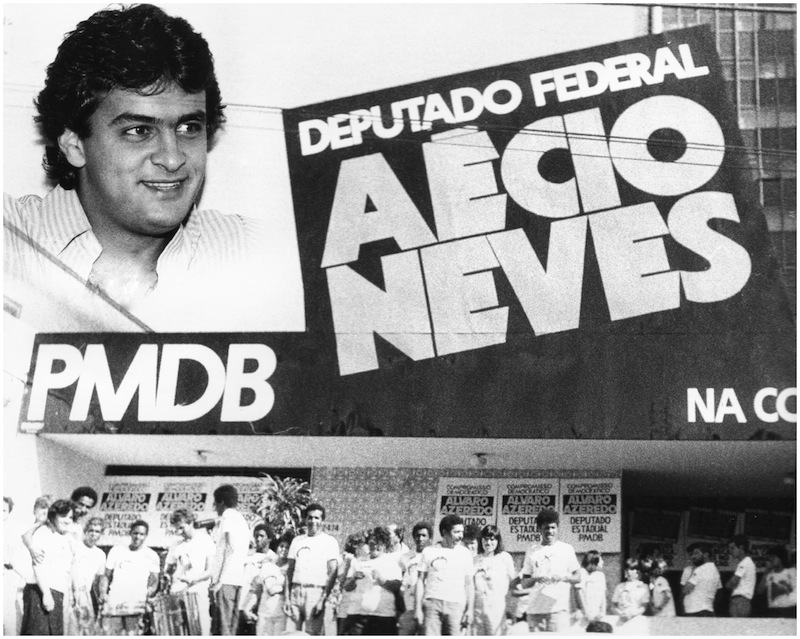 Primeiro comitê político de Aécio Neves em 1986.